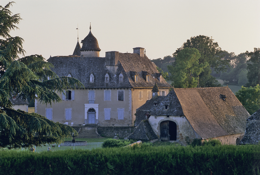 Le château de La Mothe a Calvinet, Cantal, France. .